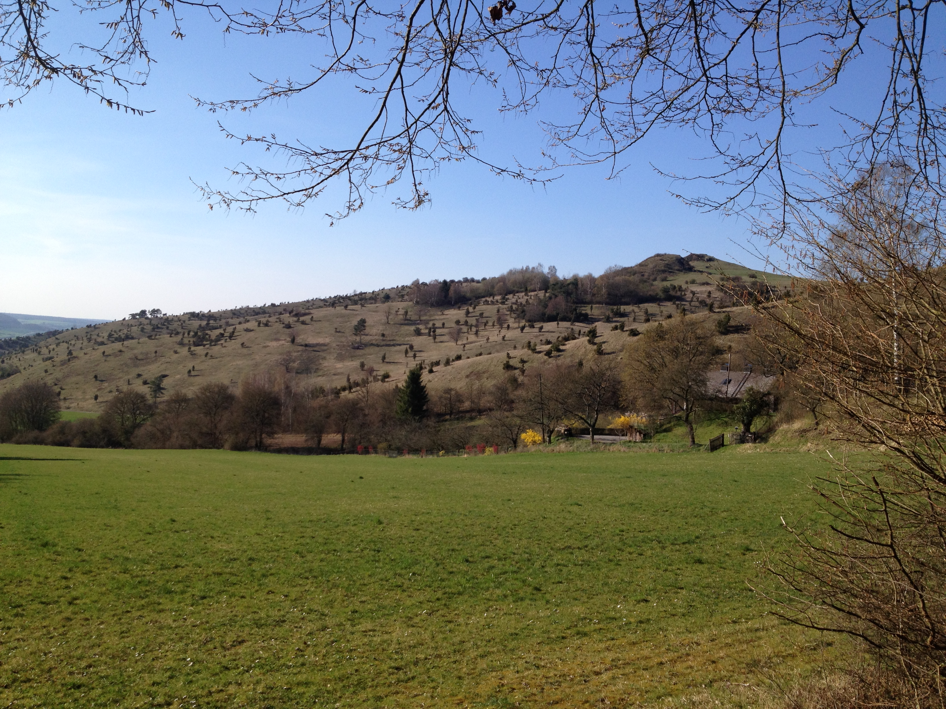 Blick aus dem Heilerbachtal zu den Wacholderheiden